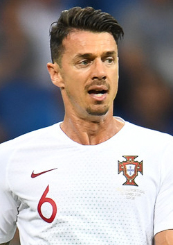 День, когда Роналду попрощался с ЧМ. Кавани и Суарес идут дальше